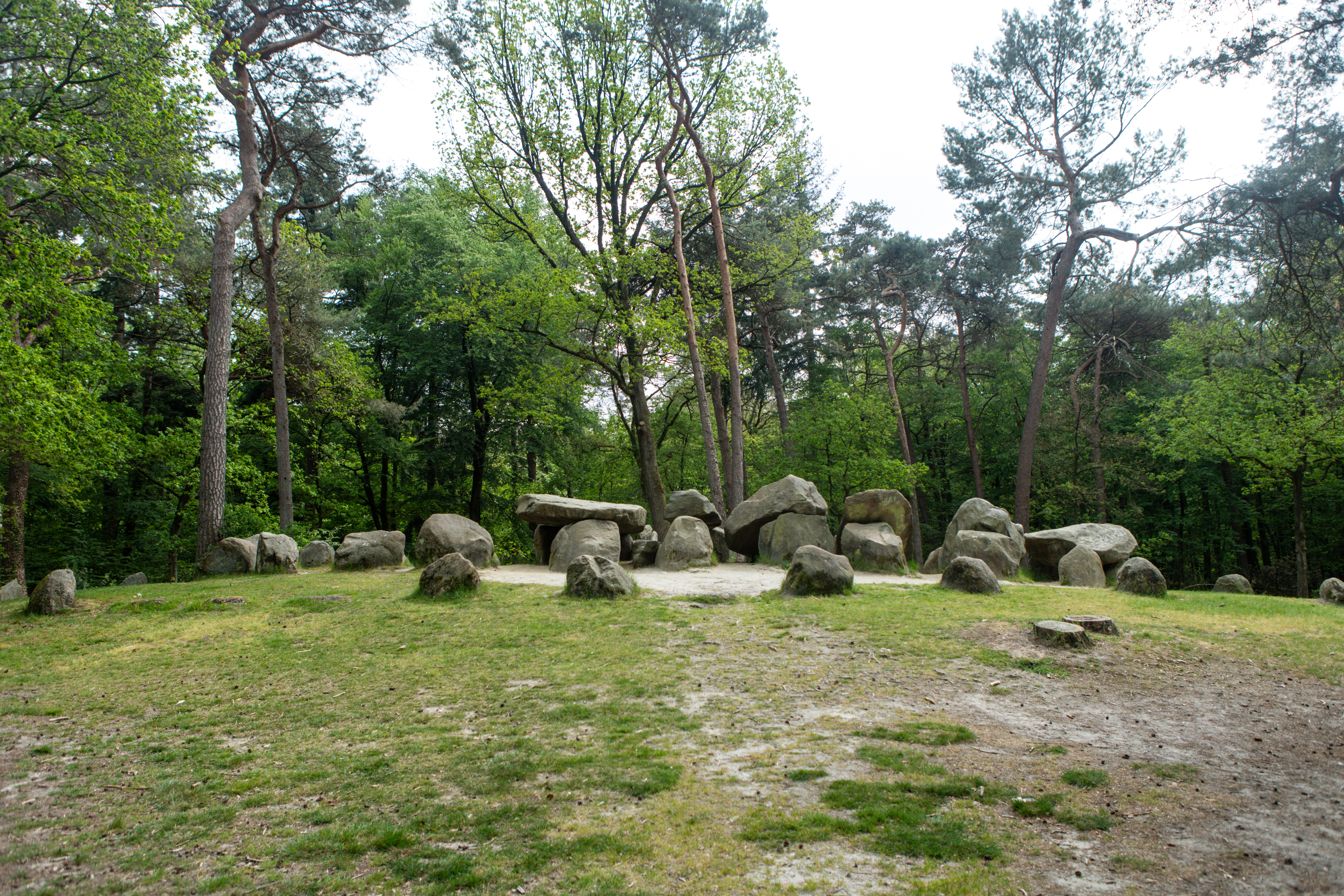 Hunebed D45 in 2019